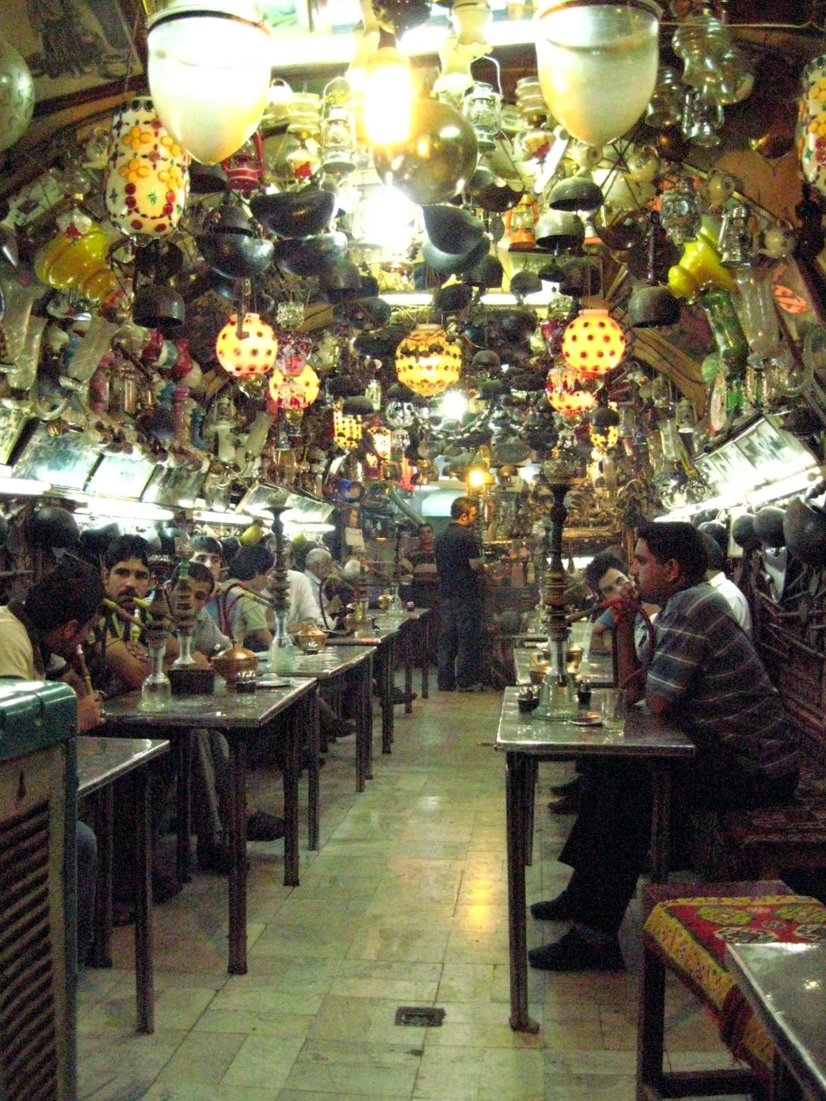 Azadegan Teahouse, Isfahan, Iran